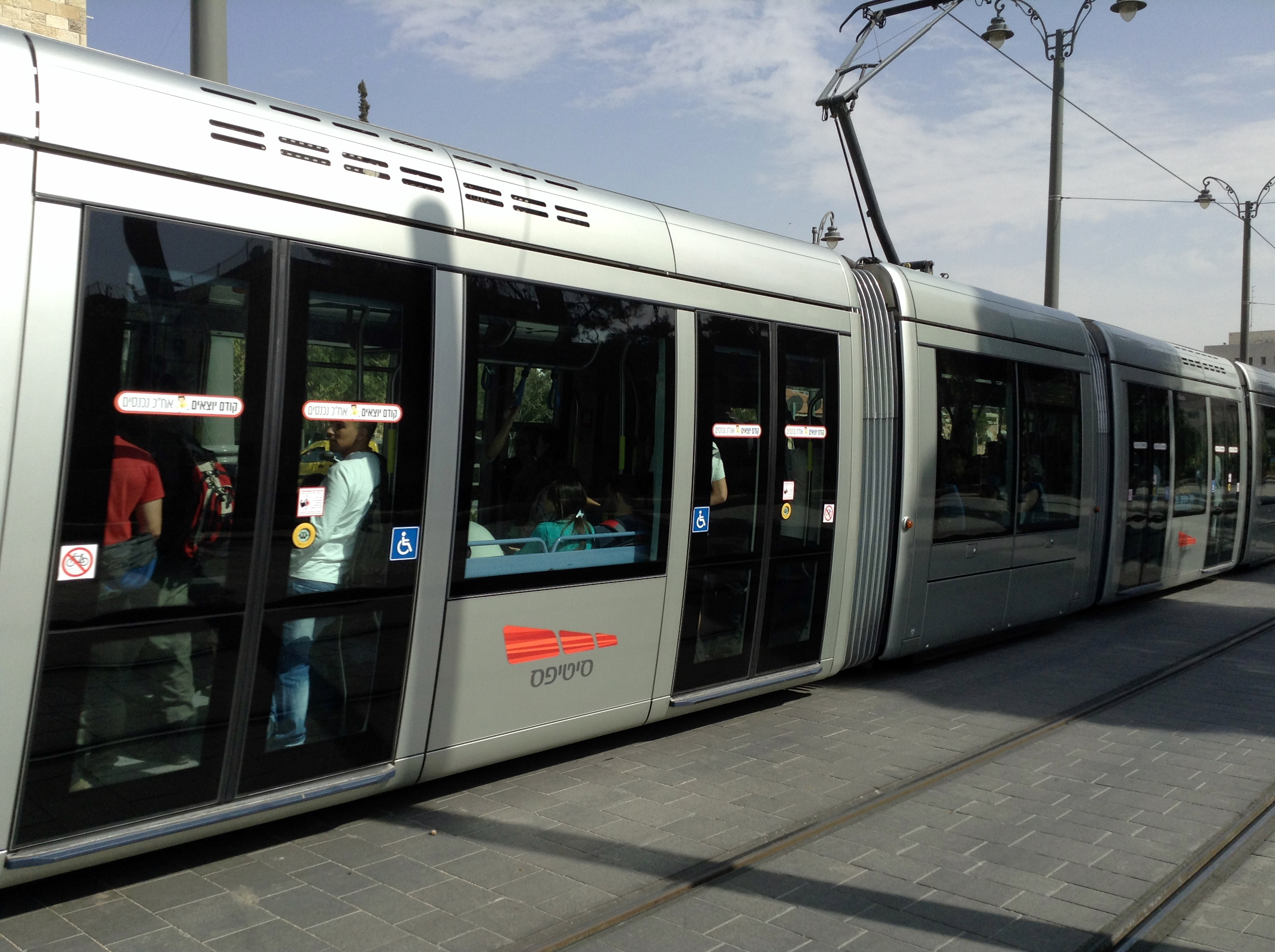 Иерусалимский трамвай на ул. Яффо.